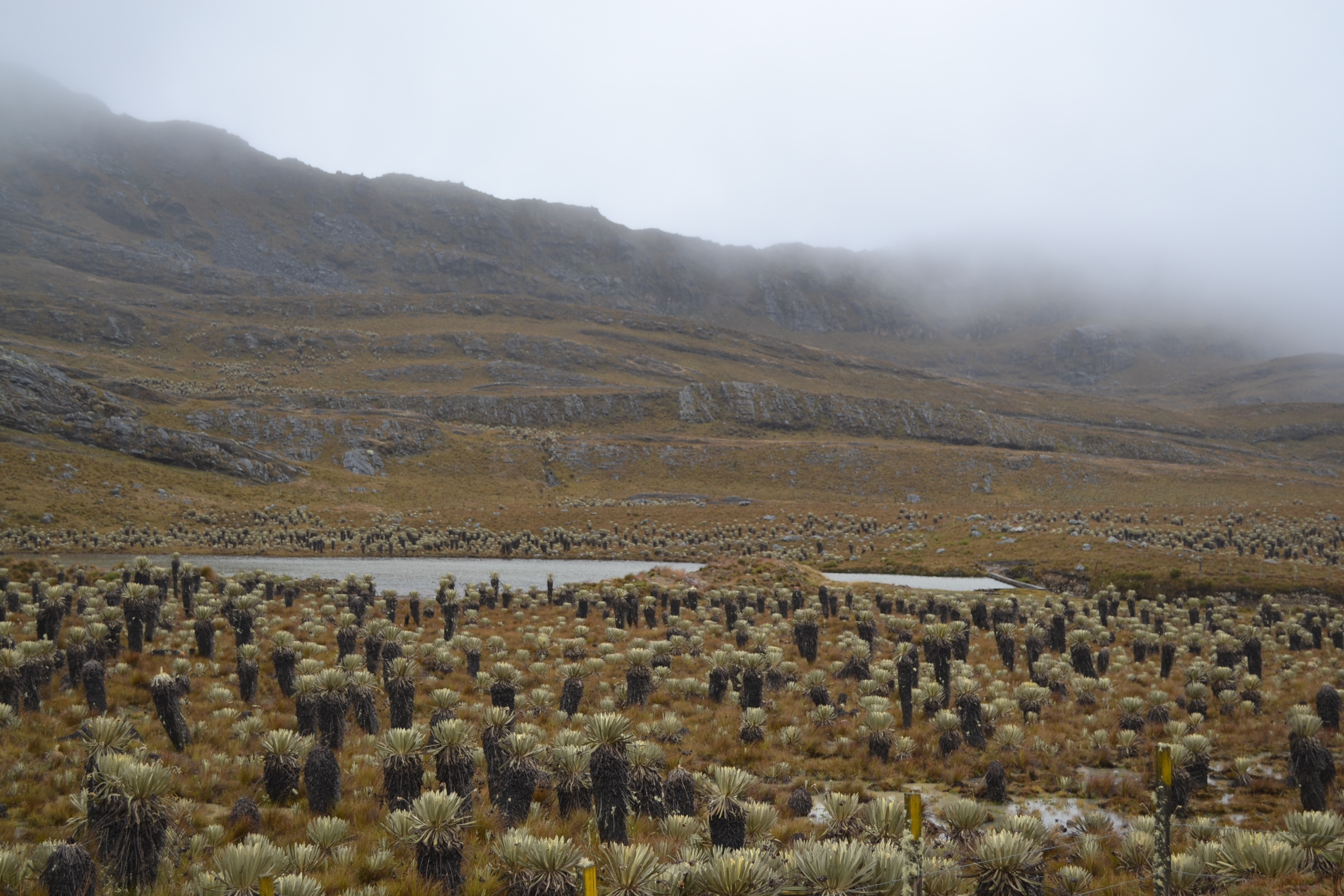 Los frailejones protegen las fuentes de agua de los colombianos. Esta fotografía fue tomada en un área protegida de Colombia con el código 1036 del RUNAP.